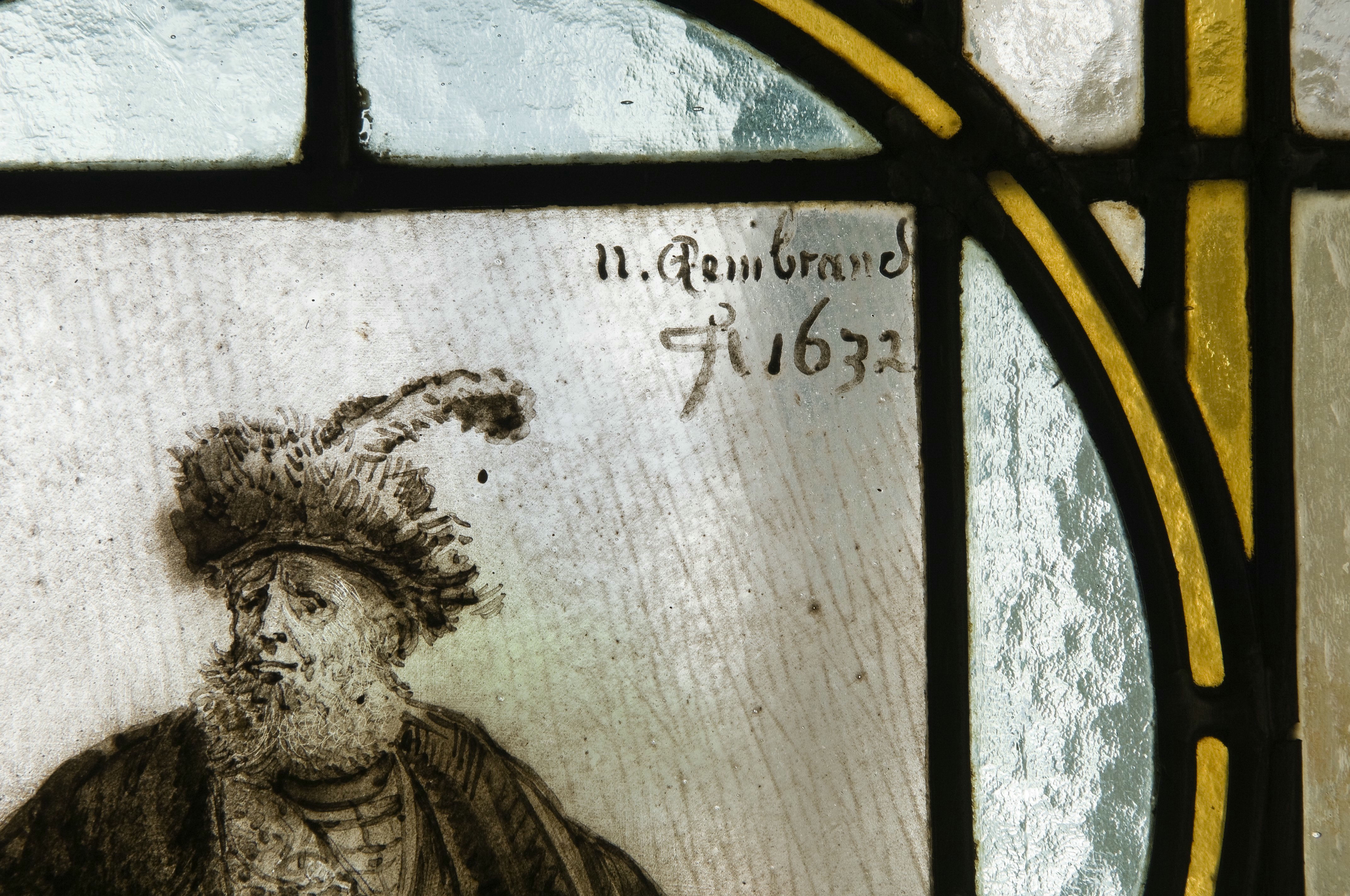 woonhuis: Interieur, detail van de deur in de badkamer. Gegraveerd staat Rembrand (opmerking: Gefotografeerd voor: 'Amsterdamse Interieurs', Huizenportretten 1875-1945.)